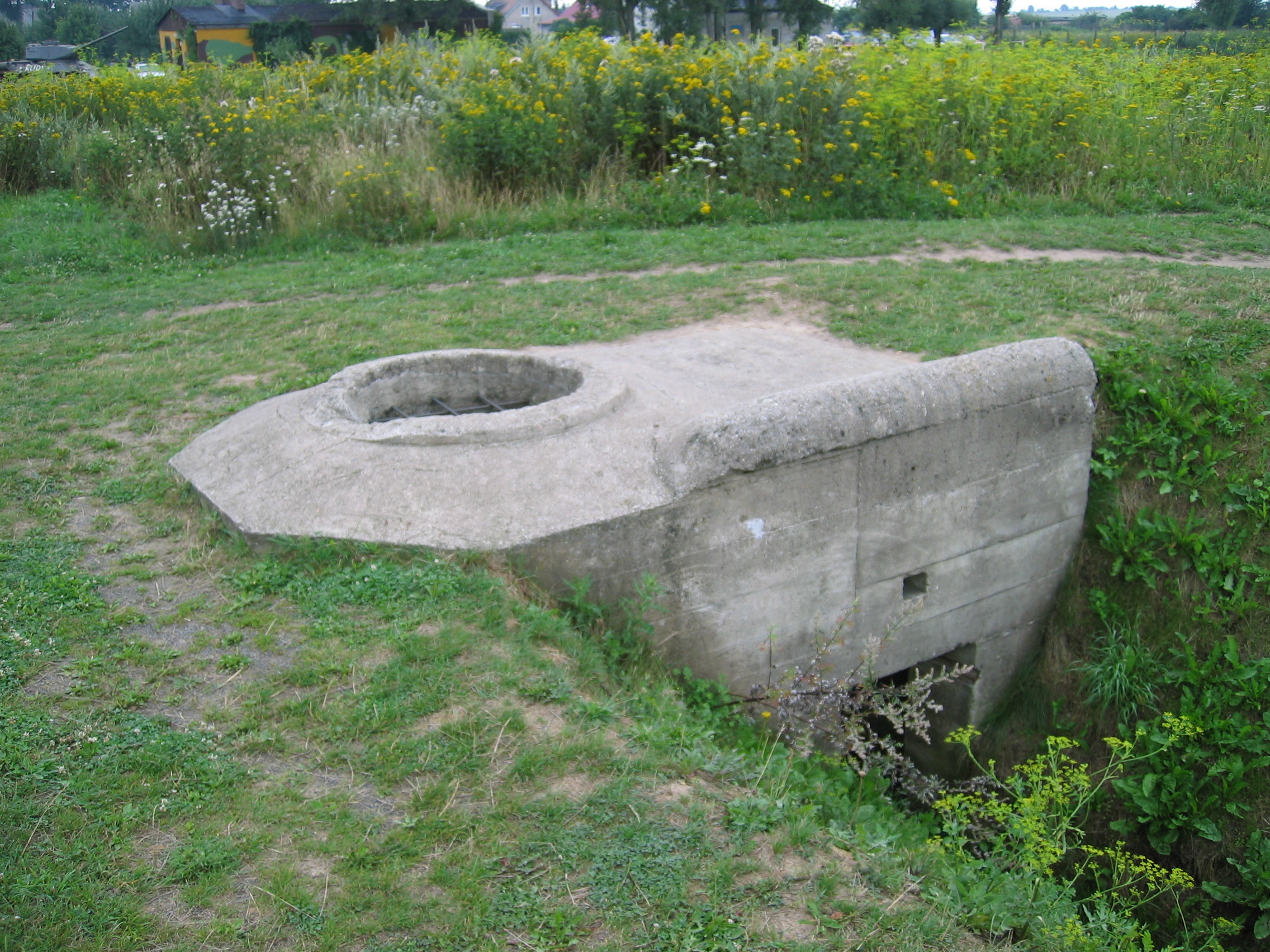 Tobruk-Stand (Ringstand) am Panzerwerk 717 der Festungsfront Oder-Warthe-Bogen.